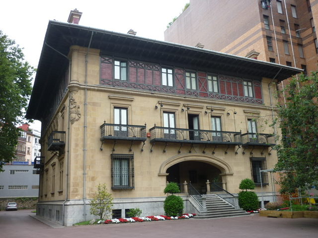 Bilboko Ibaigane jauregia.